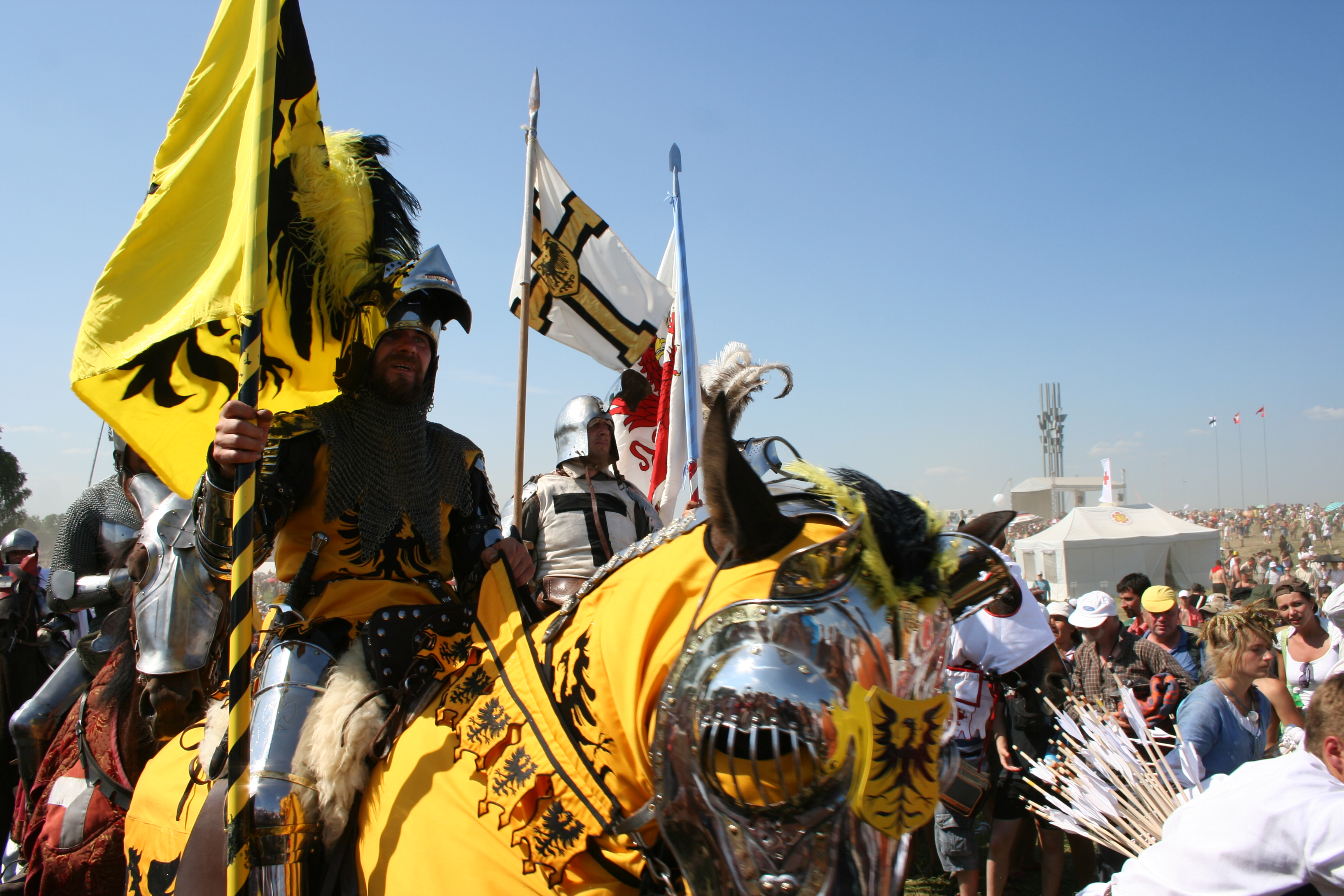 Grunwald, obchody 600-lecia bitwy